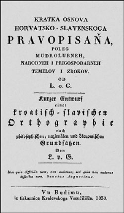 Kratka osnova horvatsko-slavenskoga pravopisanja ("Brief Basics of the Croatian-Slavonic Orthography")